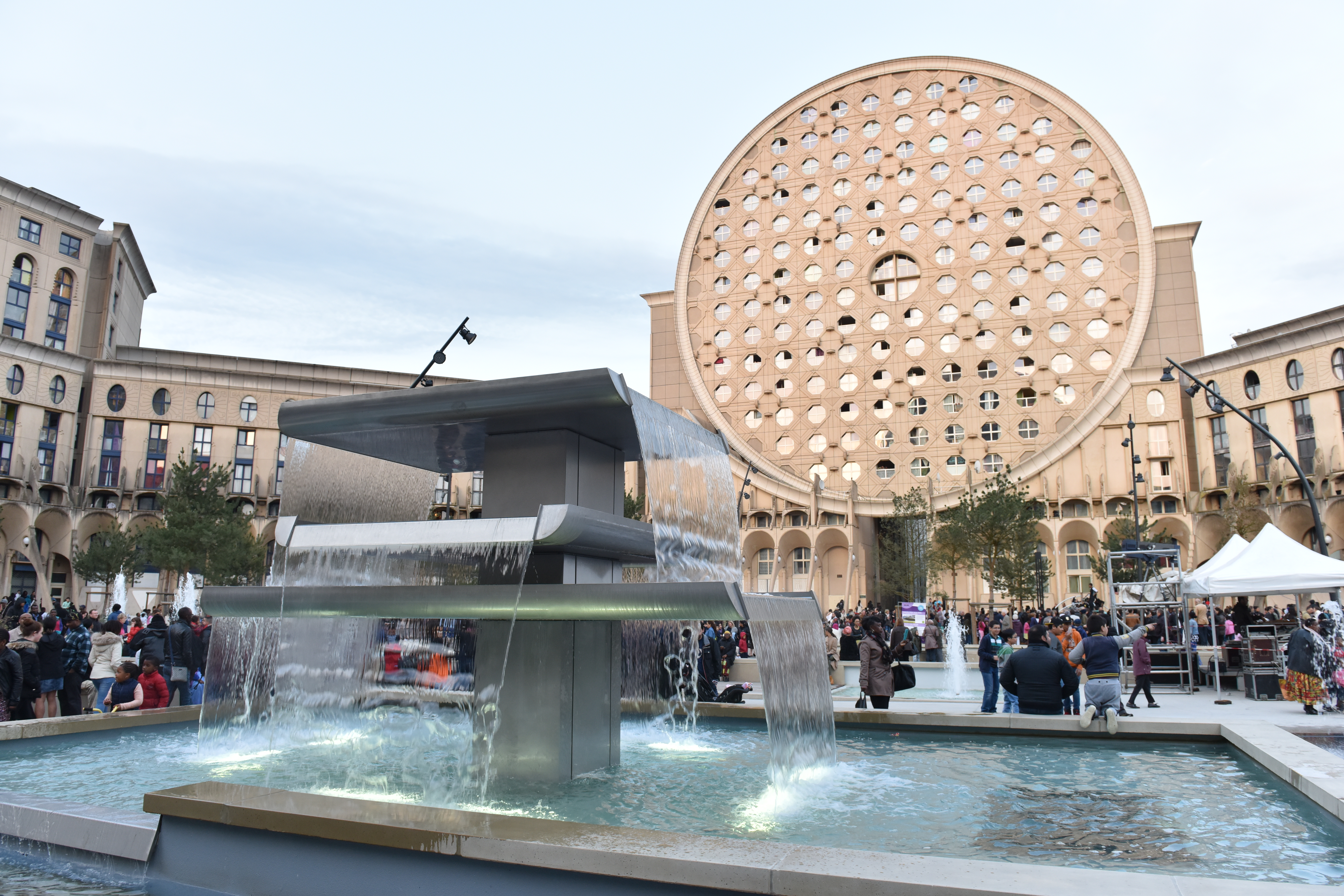 Les arènes Picasso et la nouvelle place Pablo Picasso inaugurée en avril 2015